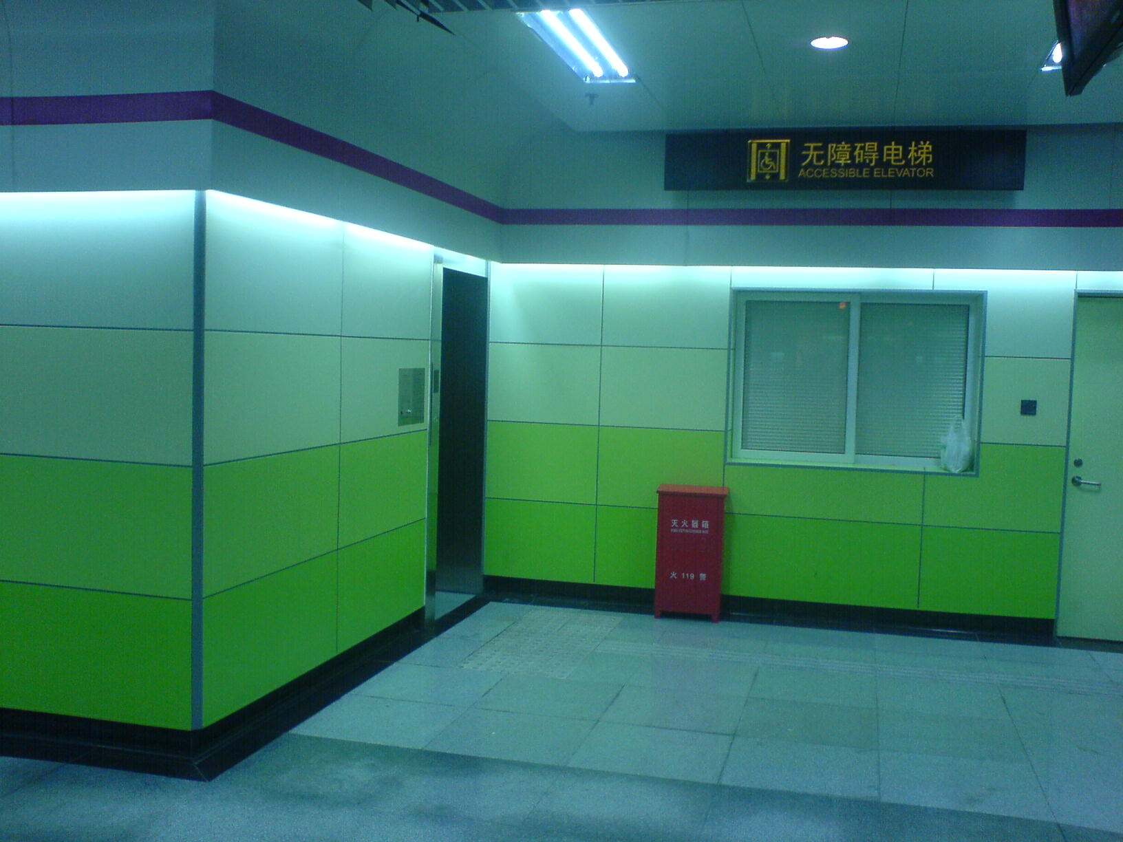 金桥路站站台